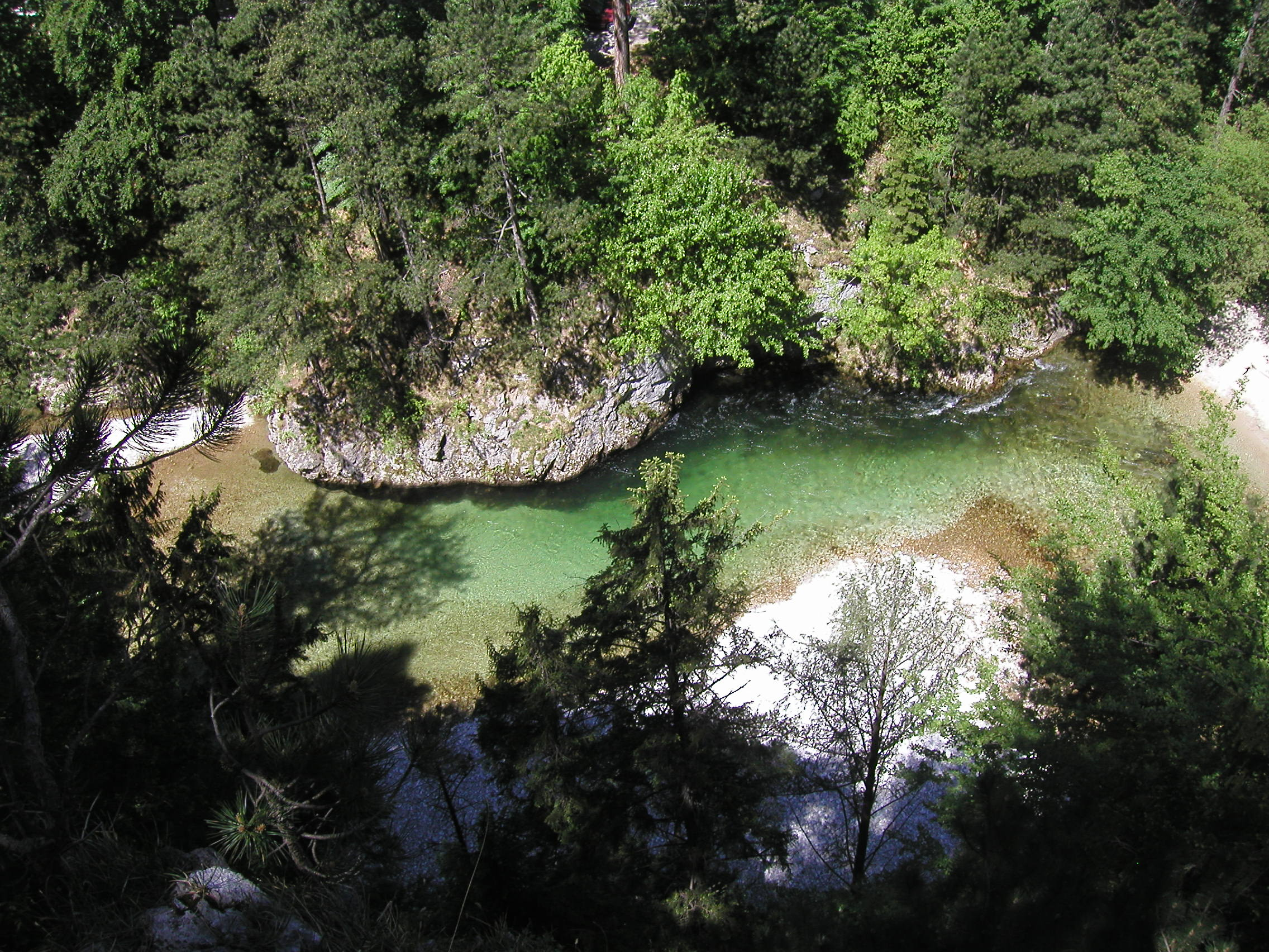 Beschreibung: Höllental (Niederösterreich). Quelle: eigene Aufnahme am 24. Mai 2003 Fotograf: Roman Klementschitz, Wien (= Einer flog zu Weit)